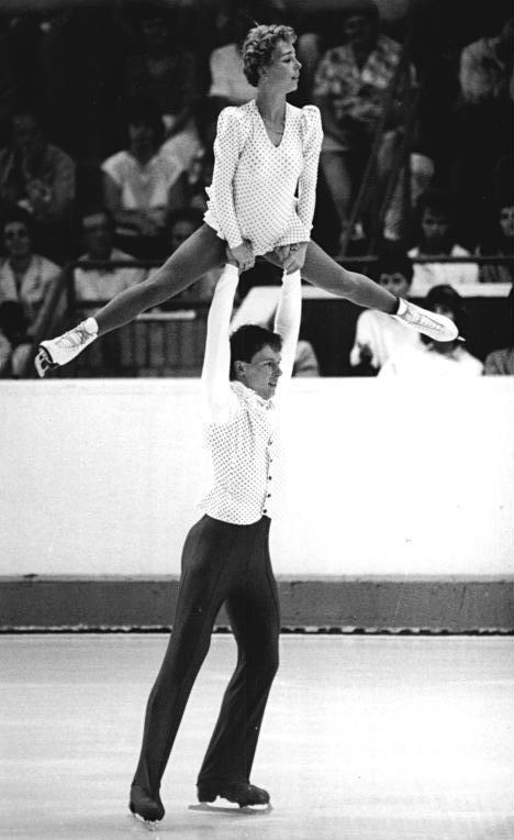 Peggy Schwarz, Alexander König ADN-ZB Oberst 10.3.89 Berlin: Vorbereitung Weltmeisterschaften im Eiskunstlaufen vom 14. bis 19. März 1989 in Paris- Wieder dabei sind nach längerer Verletzungspause die EM-Dritten des Vorjahres im Paarlaufen Peggy Schwarz und Alexander König (SC Dynamo Berlin- Foto im ISU-Schaulaufen im August 1988 Berlin).